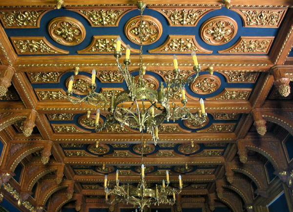 strop w sali myśliwskiej, Pałac w Starejwsi, fot. Goto (Tomasz Goździewicz) 26.05.2003 r.